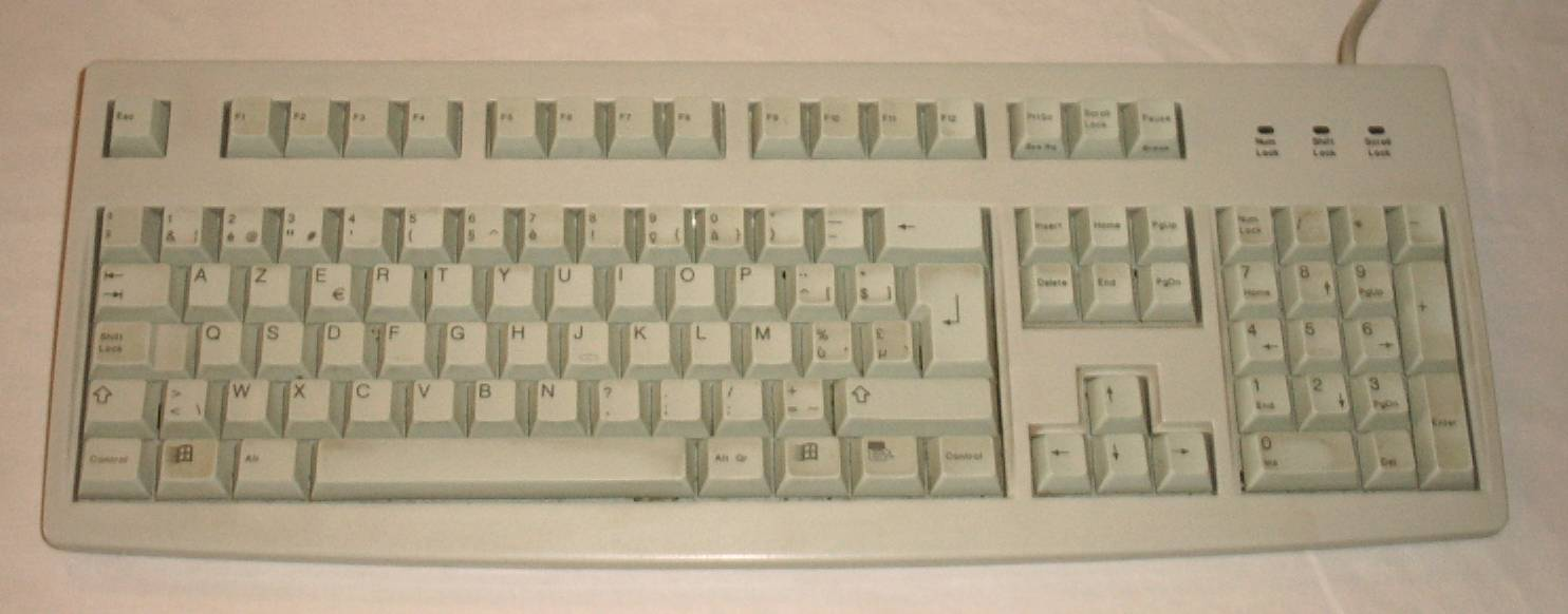 Een Belgisch AZERTY toetsenbord - foto door mezelf genomen en hierbij onder de GFDL geplaatst. Wilinckx 23 aug 2004 17:28 (CEST)